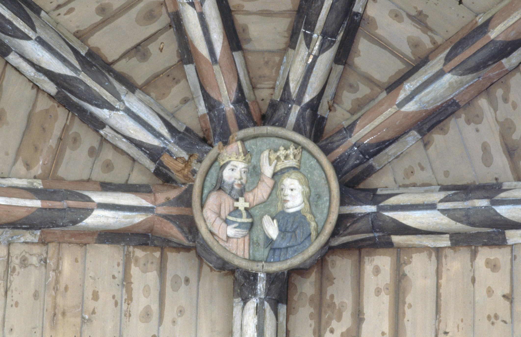 Nederlands Hervormde Kerk: Gewelfschotel met kroning van Maria; INTERIEUR, KOOR, GEWELF, ROZET (SLUITSTEEN)